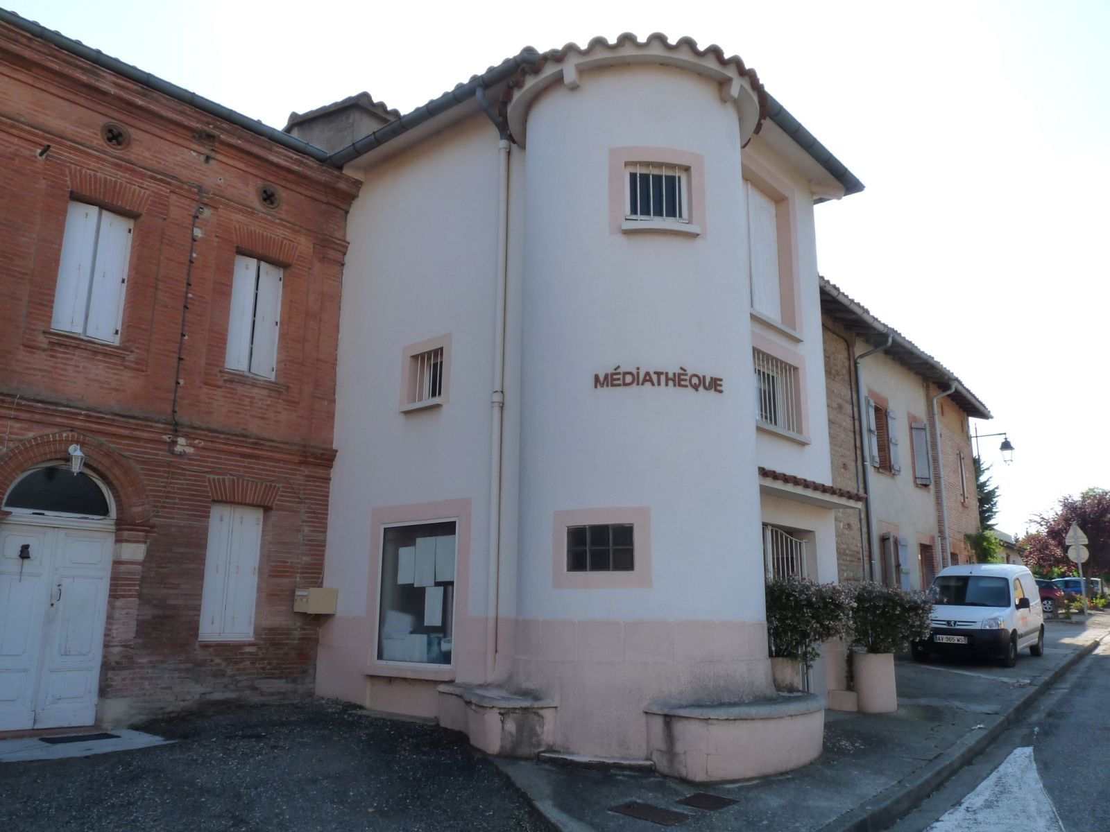 Médiathèque, Noueilles, Haute-Garonne, France